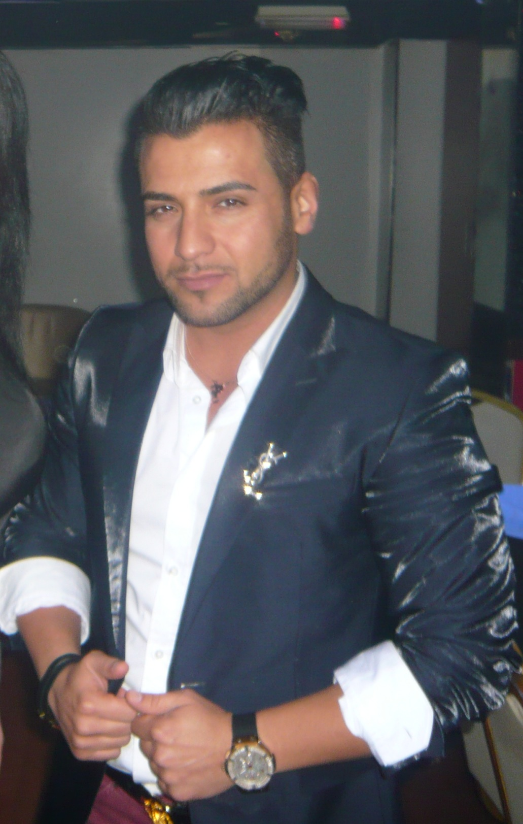 ولی در دبی در سال 1391 (2013)